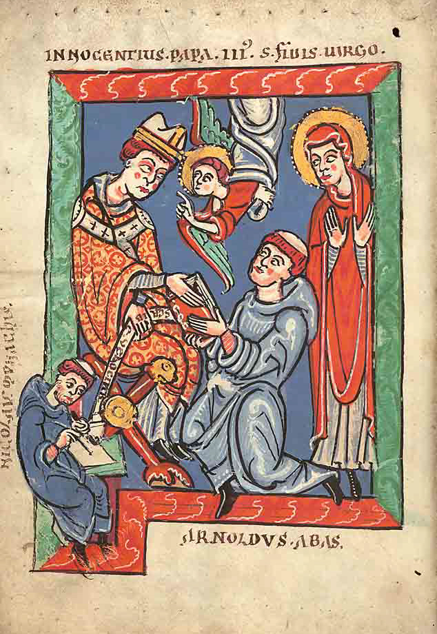 Seite aus der Handschrift "Sermones" des Innozenz III., Prag, Národni knihovna, XXIII F 144 (Lobkowitz 406; ehemals Kloster Weißenau), fol. IVv; abgebildet sind: Innozenz III., Abt Arnold von Citeaux und hl. Jungfrau Fides, Schreiber "Nicolaus monachus"